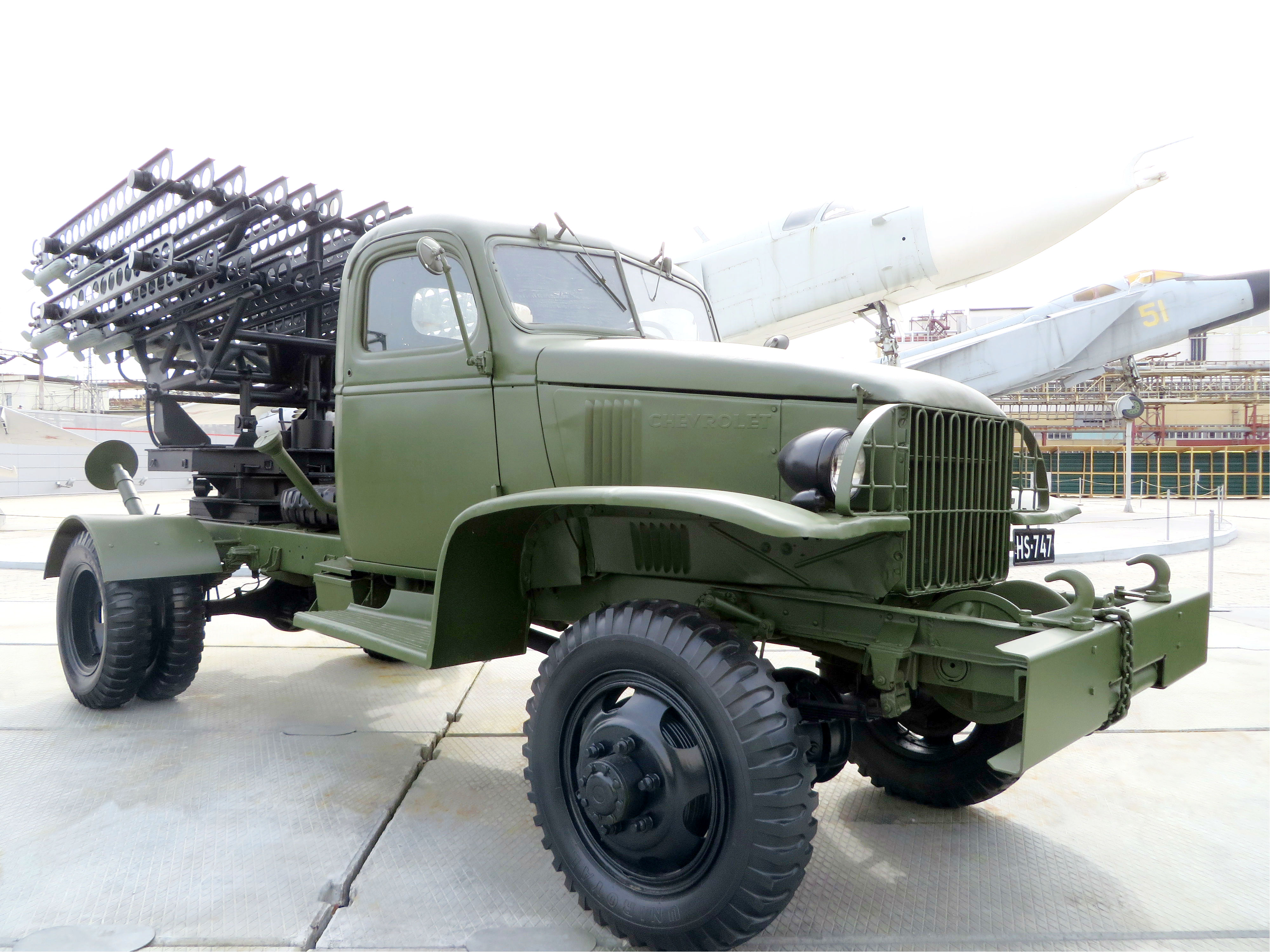 Макет. Боевая машина реактивной артиллерии обр. 1942 г.